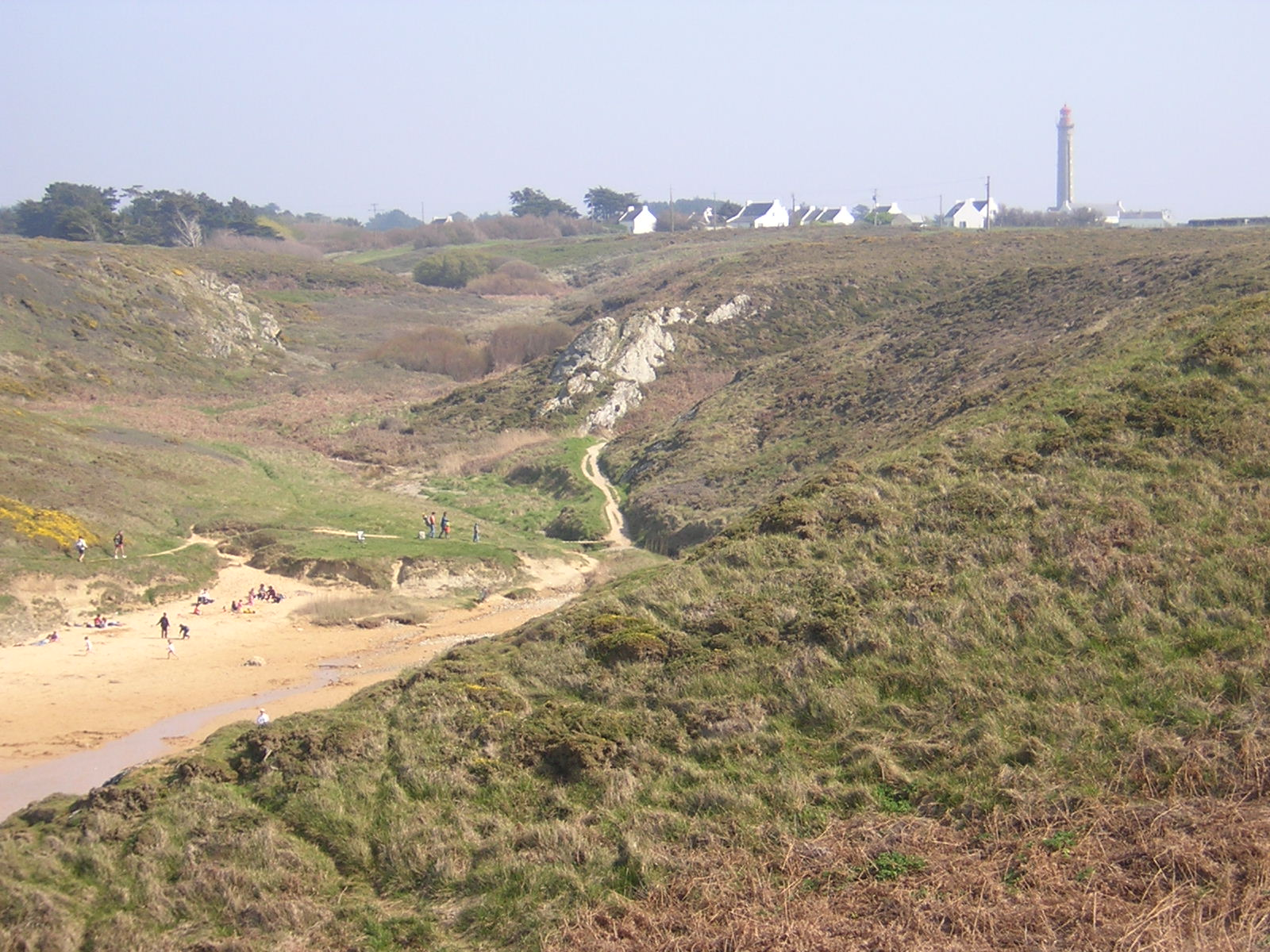 Belle-île le Grand Phare